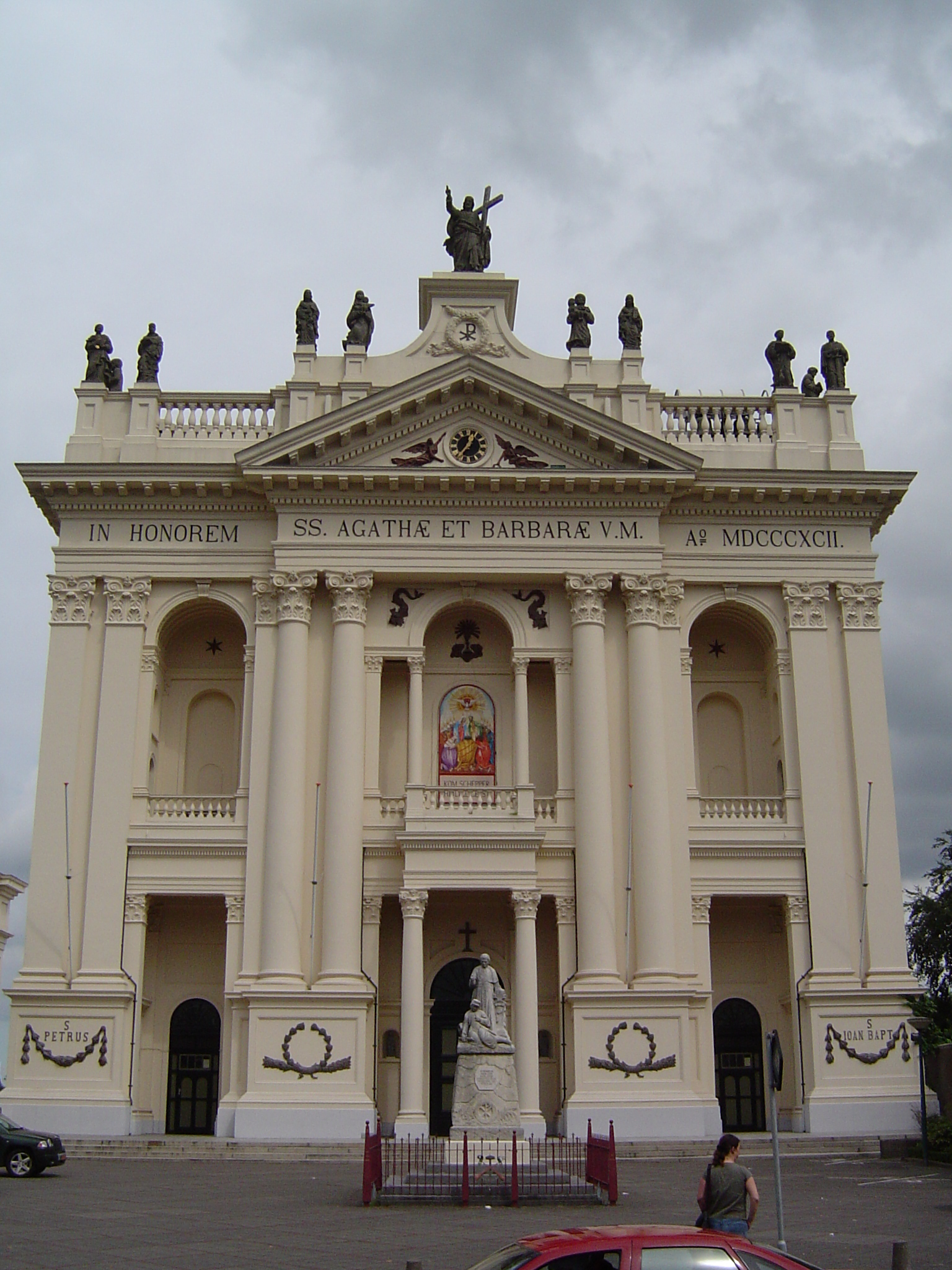 Oudenbosch Basilica, Oudenbosch, the Netherlands